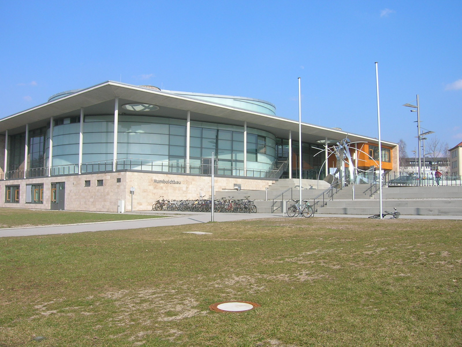 Technische Universität Ilmenau (Thüringen), Humboldtbau